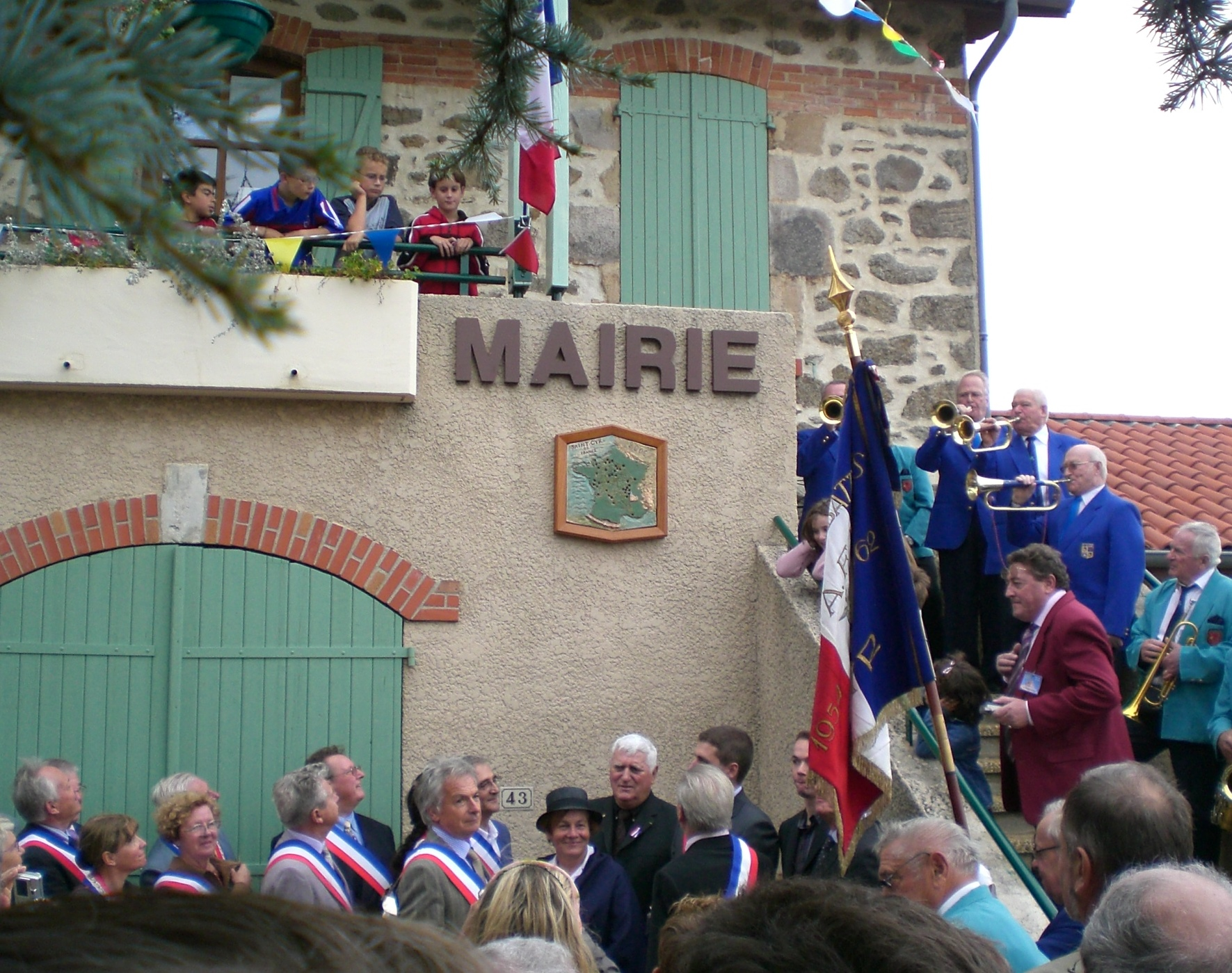 St-Cyr de France mairie rec